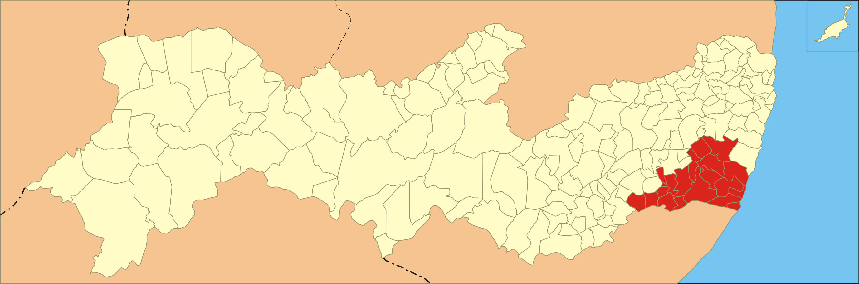 Localização da microrregião no estado de Pernambuco.